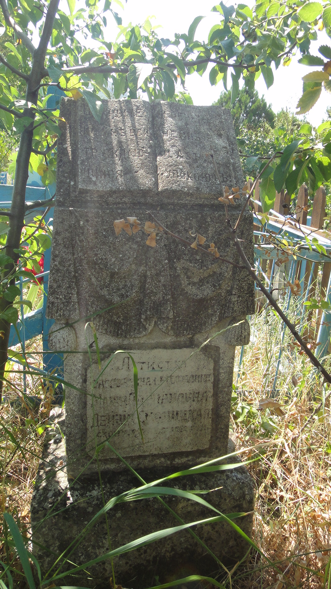 Коктебельское кладбище